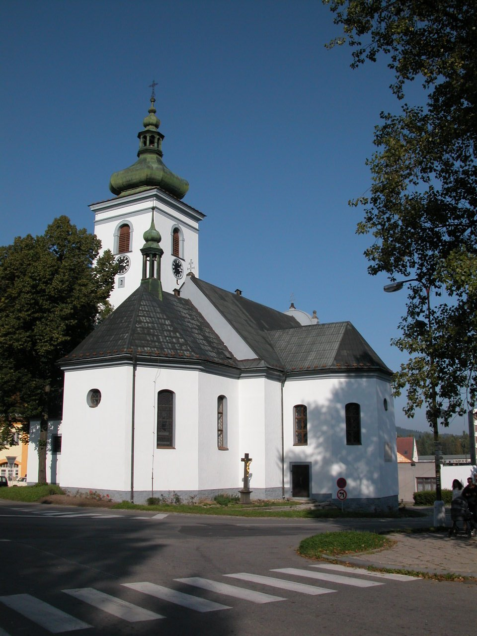 Česky: Kostel sv. Kateřiny ve Volarech